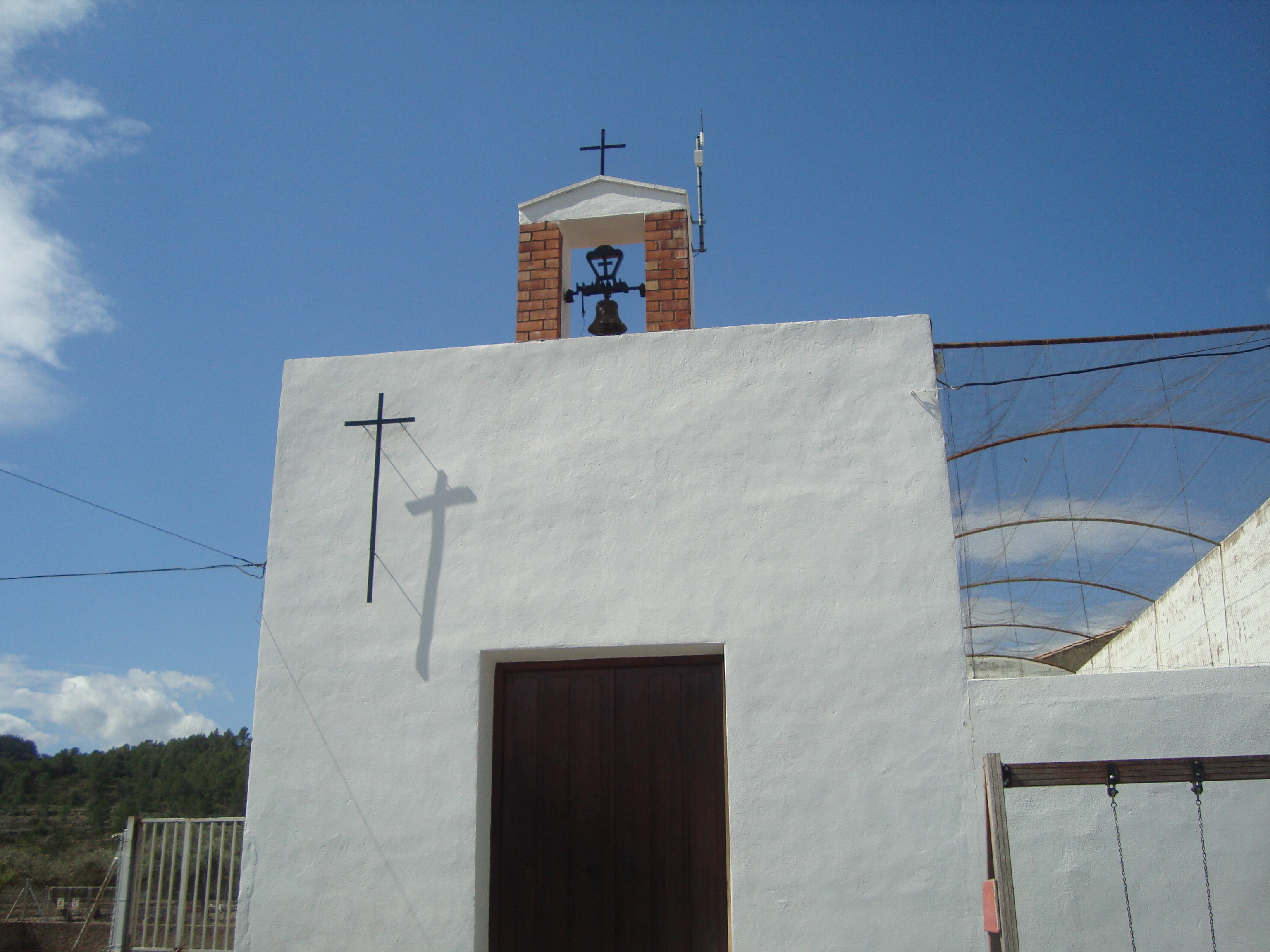 Capilla del Pilar (Anroig, Chert/Xert)